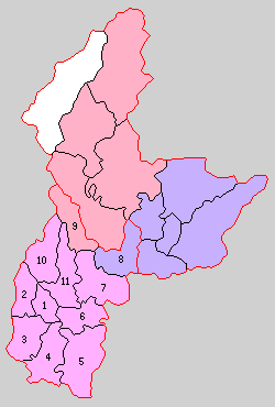 兵庫県加西郡の町村制時点の町村。